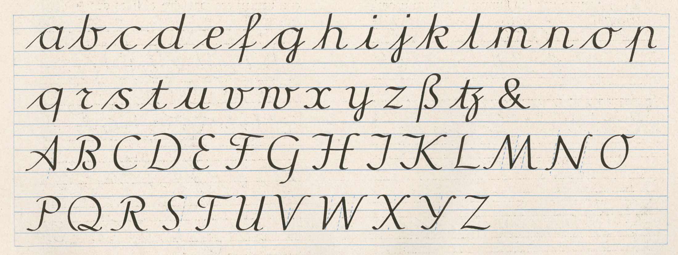 Lateinisches Alphabet in Offenbacher Schrift, mit Breitfeder geschrieben. Ursprüngliche Beschreibung: "Das lateinische Alphabet. (Ziffern und Zeichen wie in der deutschen Schrift. Nur das Trennungszeichen ist ein einfacher Strich.)"